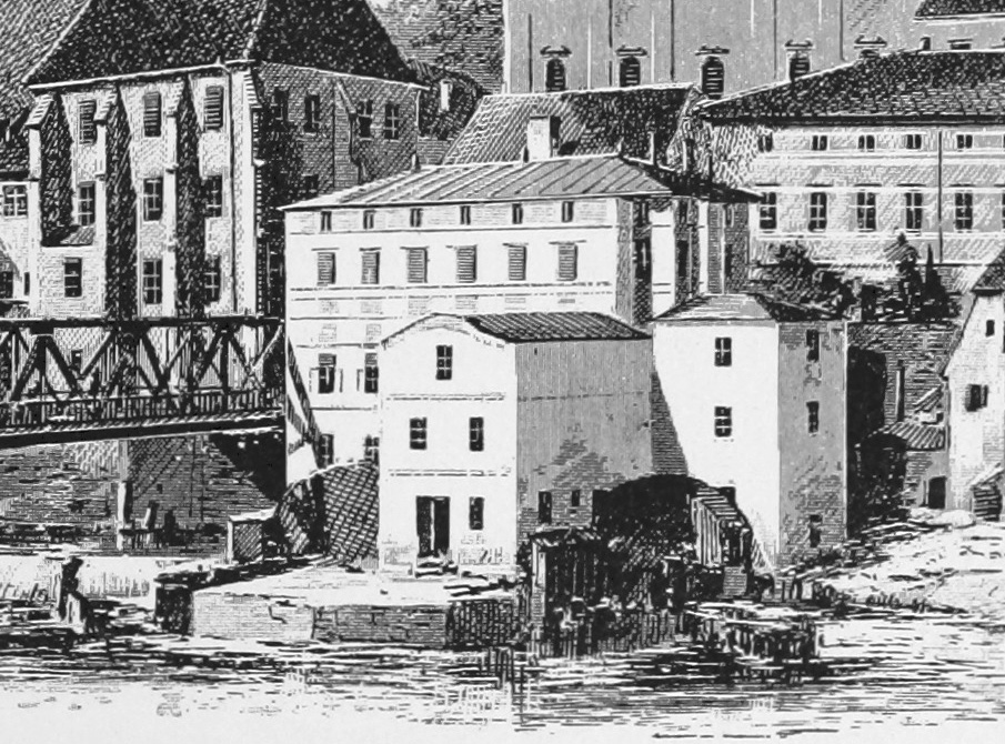 Steyr: Ansicht der Spitalmühle, auch Hofmühle, (Michaelerplatz 15) mit viergeschossigem Wohnhaus und Mühlengebäude (links) und Lohstampf (rechts). Die Gebäude wurden bei einem Bombenangriff 1944 schwer beschädigt und später beseitigt.